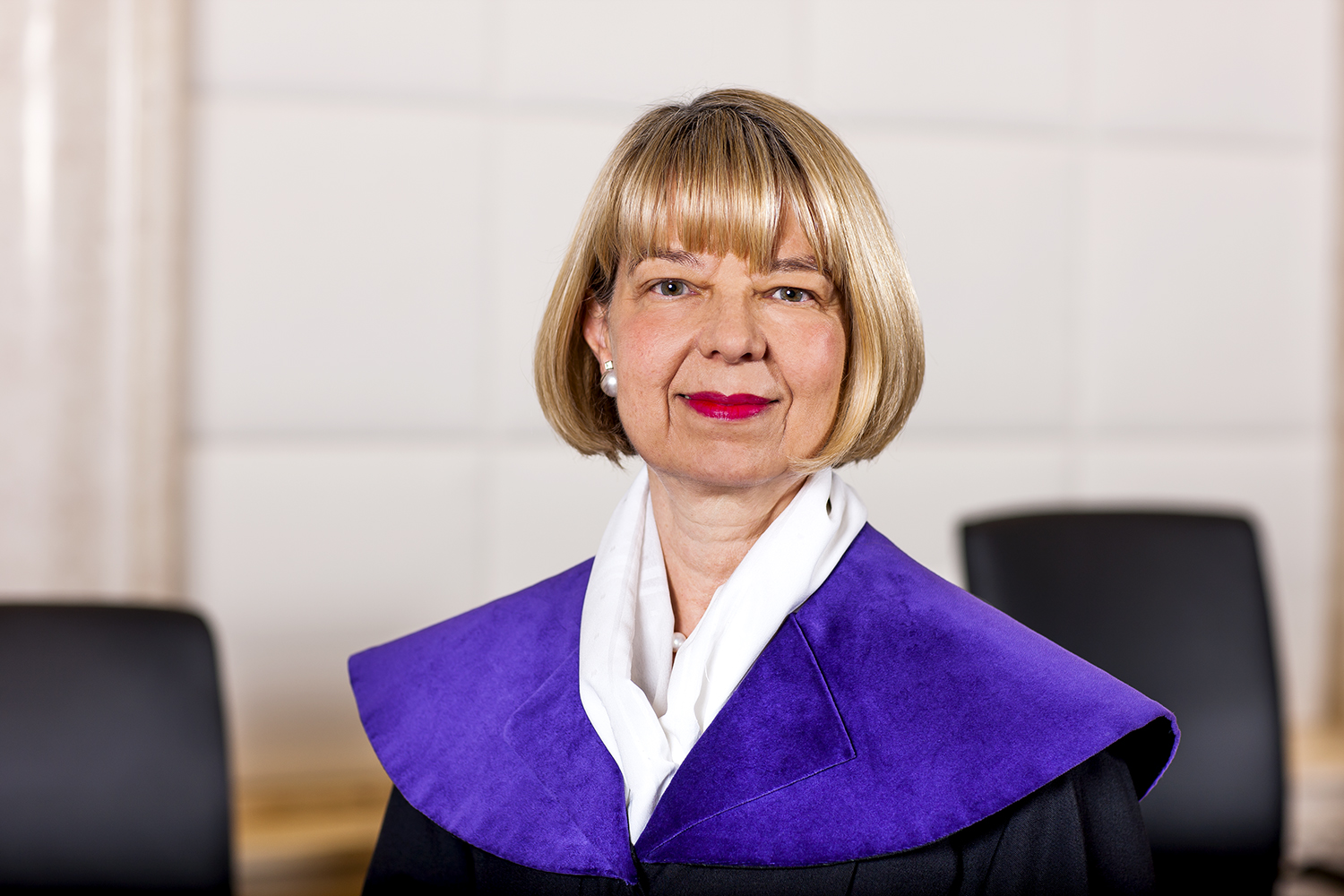 Dr. Gabriele Kucsko-Stadlmayer, Ersatzmitglied des österreichischen Verfassungsgerichtshofs von 1995 bis 2015. Aus Österreich entsandte Richterin am Europäischen Gerichtshof für Menschenrechte seit 2015.